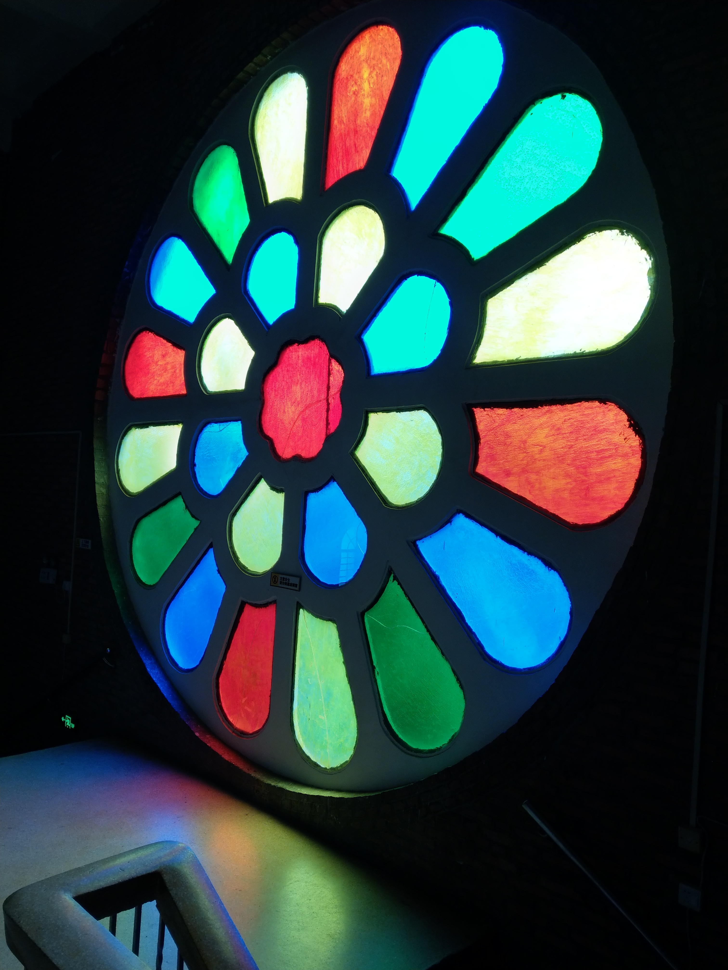 基督教光孝堂頂層之彩色玻璃曾於文革時期遭受破壞，復堂後重造重置。